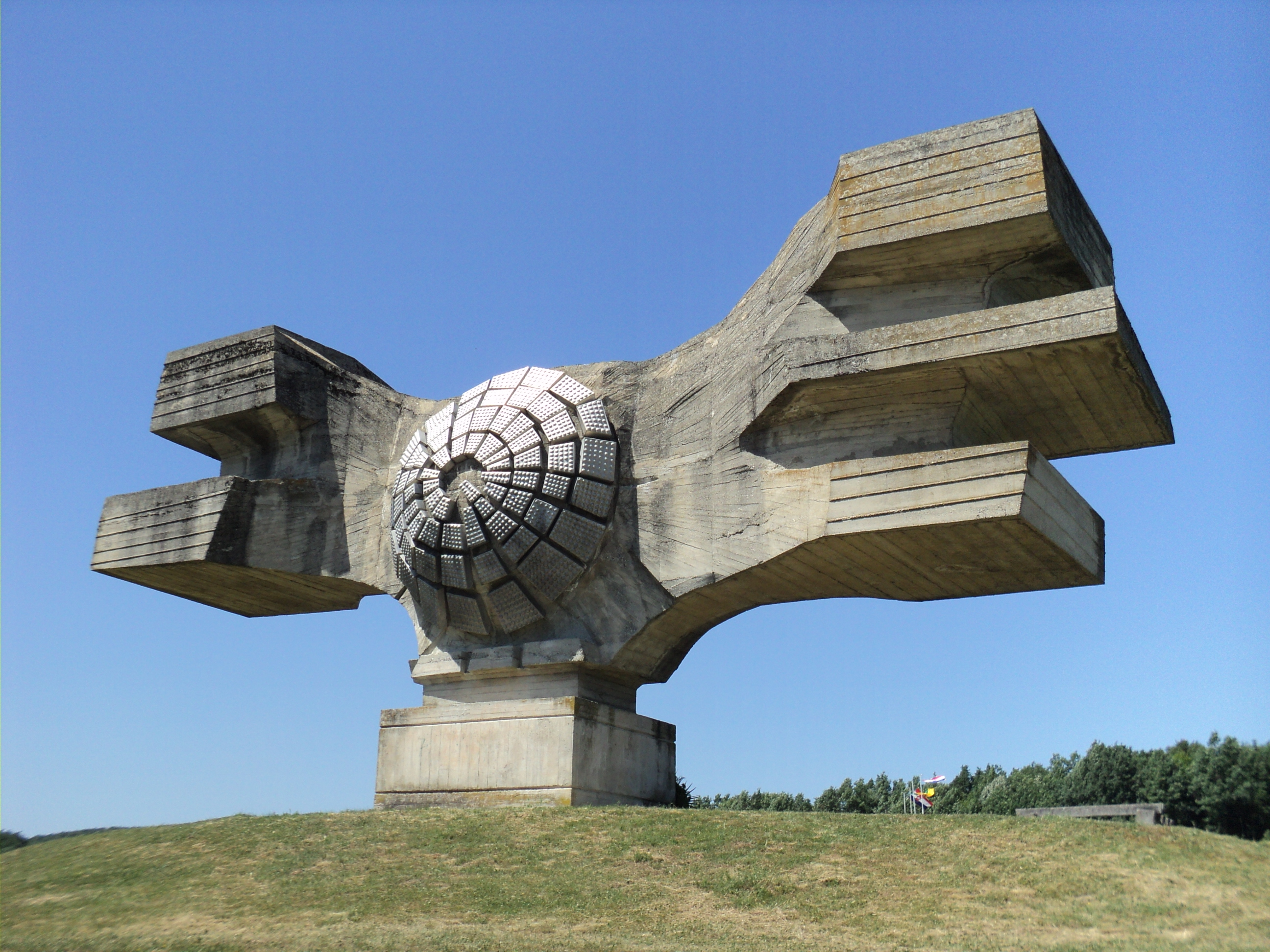 Spomenik revolucije naroda Moslavine kod sela Podgarić. Self-made. Jun 2011.